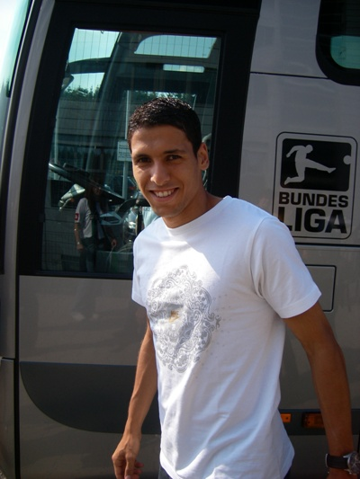 Karim Matmour nach dem Borussia-Training